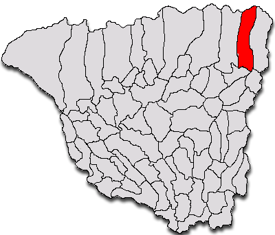 Categorie:Hărţi ale judeţului Gorj